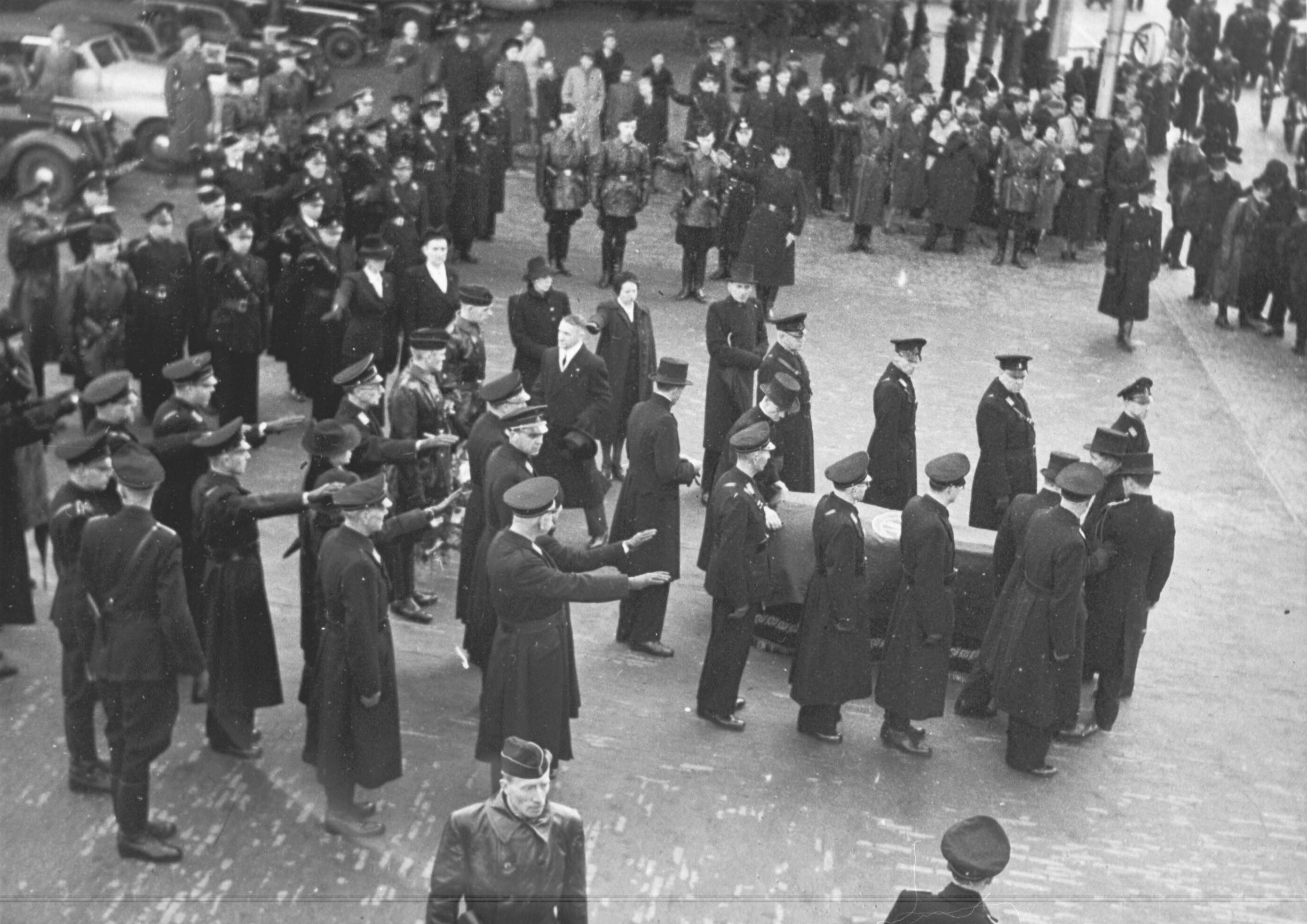 'Begrafenis van kameraadske Reydon te Lunteren. Mevrouw Reydon, vrouw van de gevolmachtigde van den Leider voor Volksvoorlichting H. Reydon, werd het directe slachtoffer van een moordaanslag op 9 februari 1943. Reydon zelf stierf pas op 24-8-1943 aan de gevolgen van deze aanslag.' De aanslag werd gepleegd door G.W. Kastein van de verzetsgroep CS-6 uit Amsterdam. Deze foto is afkomstig uit het archief van de Fotodienst der NSB.